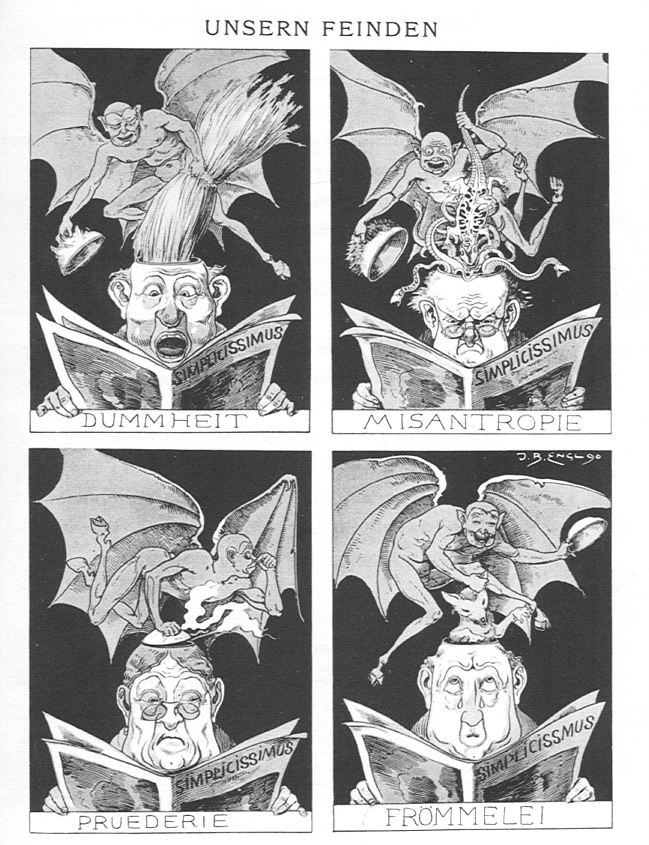 Unsern Feinden Dummheit, Misanthropie, Prüderie, Frömmelei.